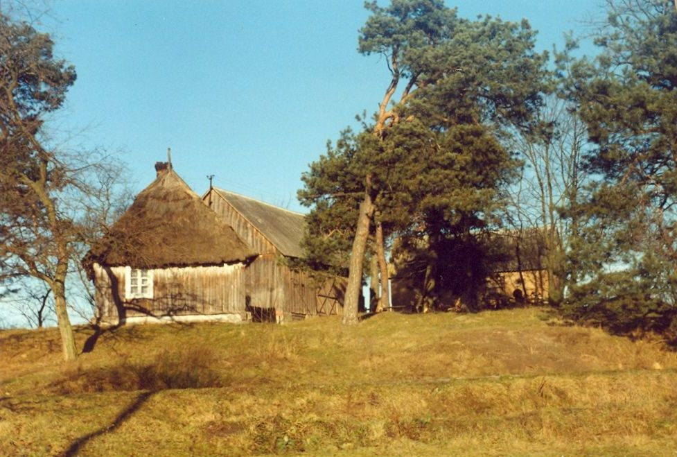 Kozarze-luty